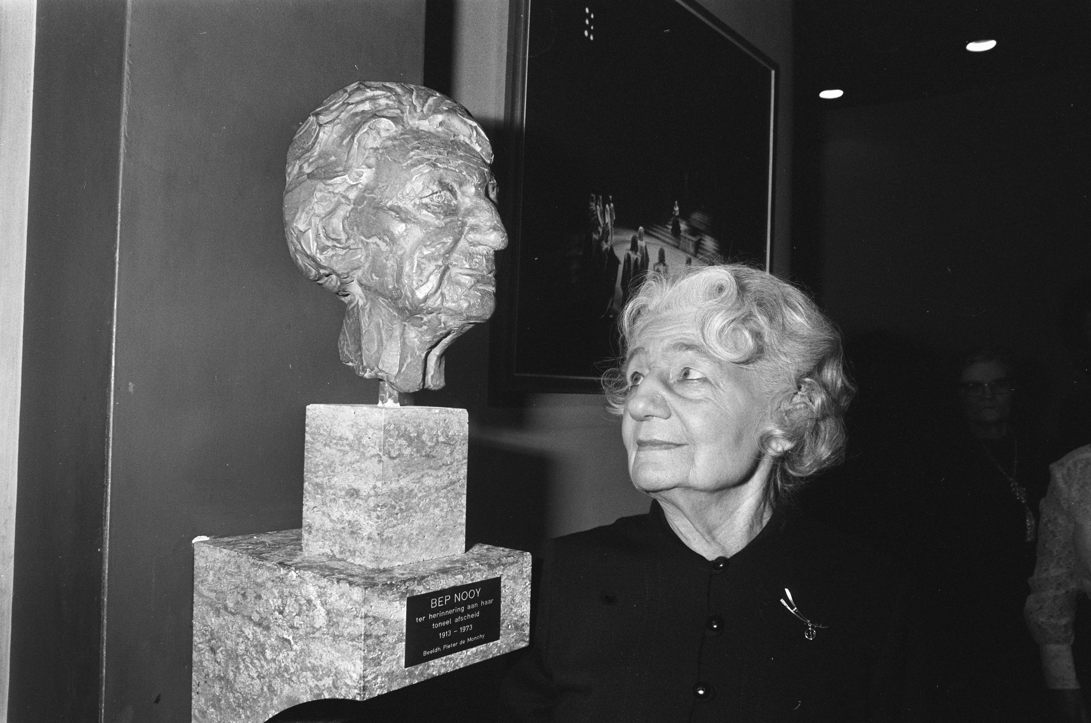 Gebeeldhouwd portret van Beppie Nooy sr. onthuld in Carre te Amsterdam, Beppie Nooy sr. bij gebeeldhouwd portret.